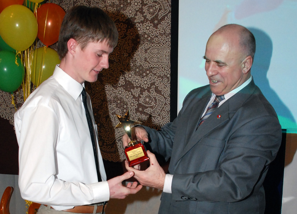 Председатель комитета по спорту и физической культуре Вологодской области Виктор Некрасов вручает специальный приз премии "Звезда надежды" молодому конькобежцу Антону Старостину. Вологда, 28 апреля 2008 года.